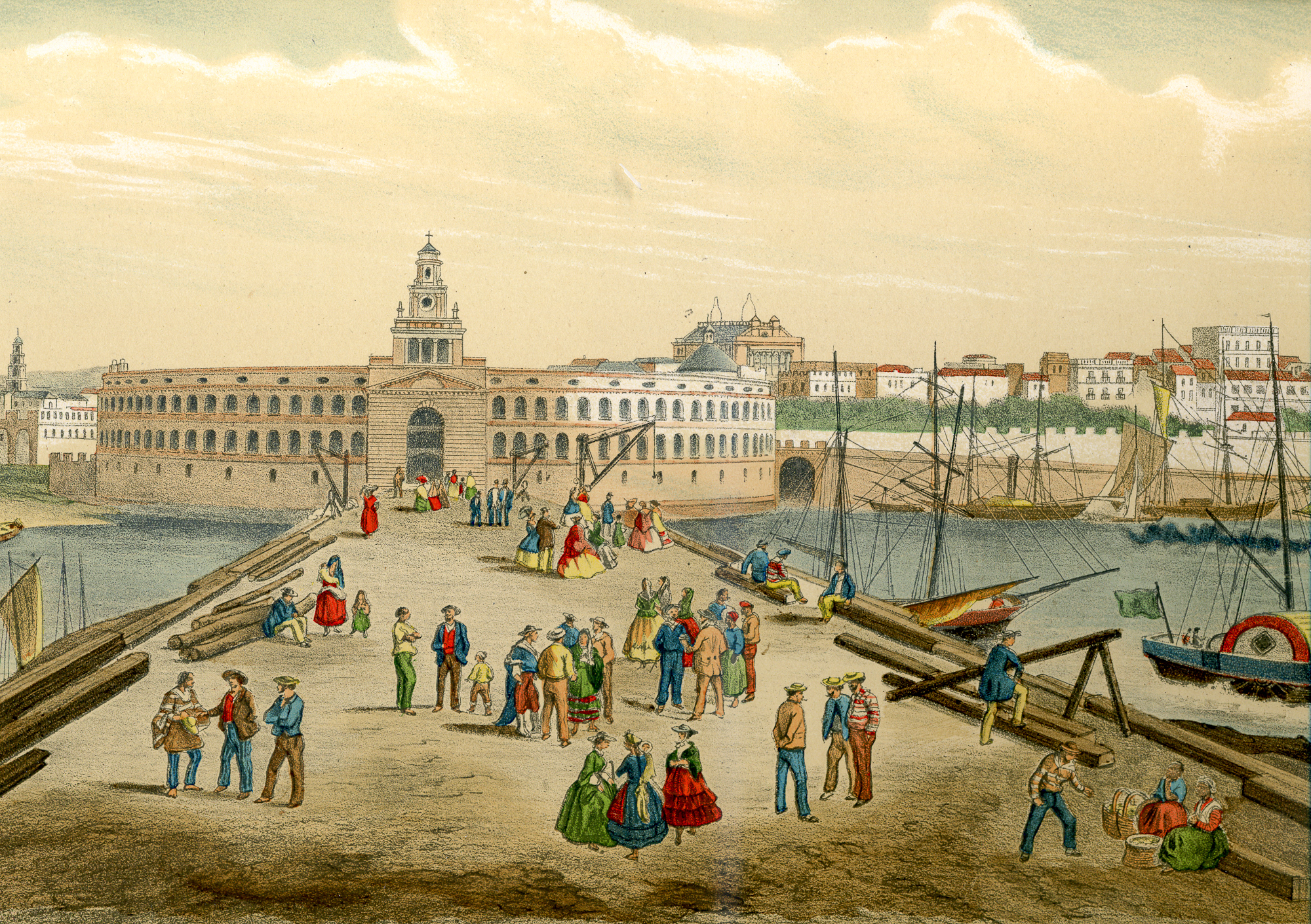 Se observa en primer plano el edificio de la Aduana de Taylor, con su muelle dotado de grúas para la carga y descarga de mercaderías.